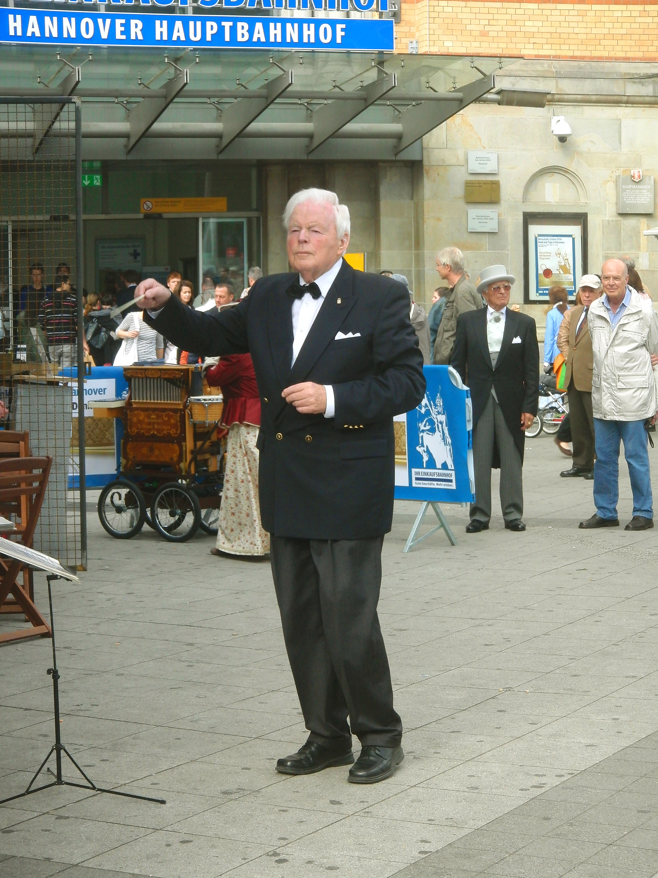 Ernst Müller dirigiert am 27. Juni 2014 das Niedersächsische Blasorchester auf dem Ernst-August-Platz vor dem Hauptbahnhof Hannover ...